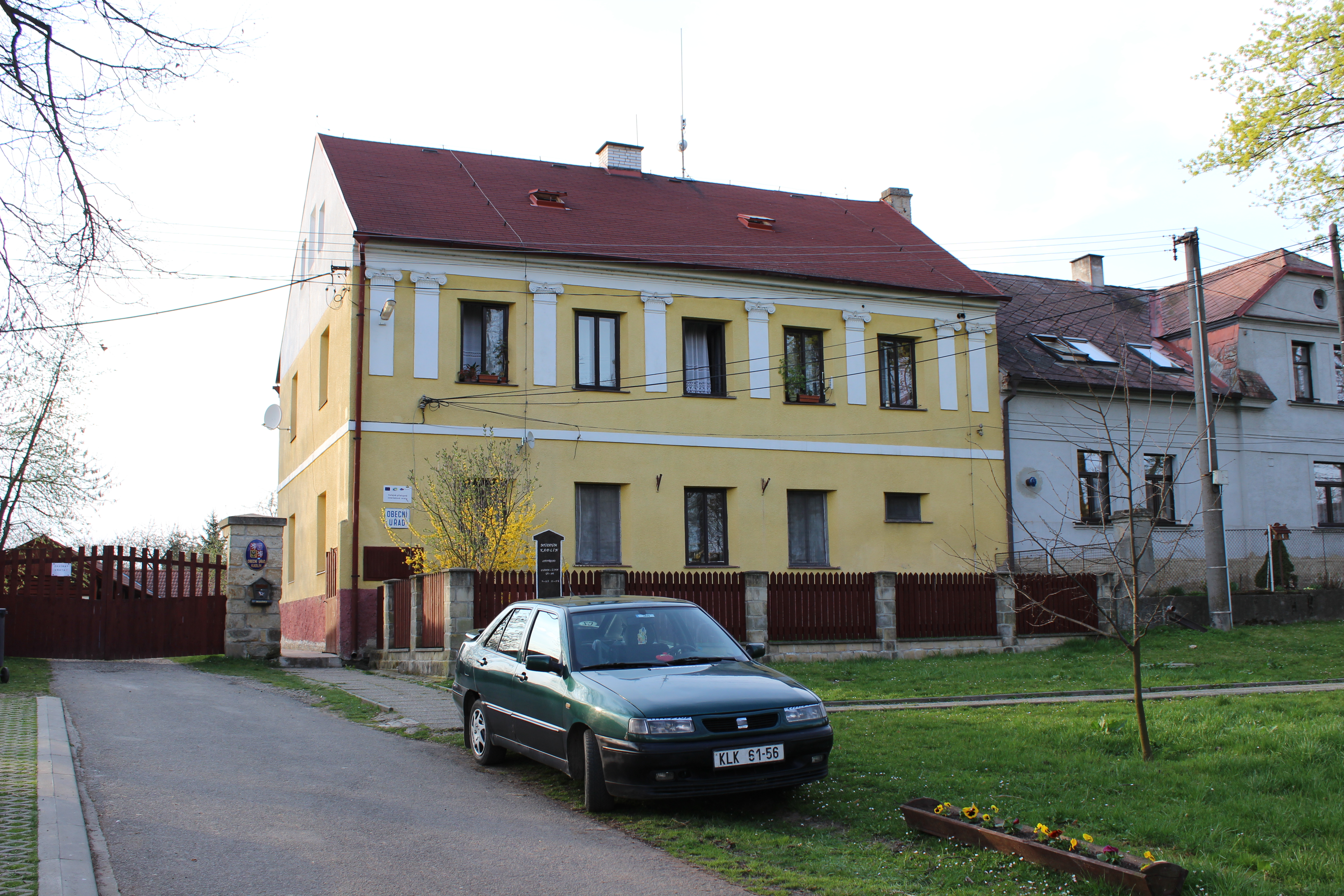 Obecní úřad v domě číslo popisné 8 v Kadlíně. This photograph was taken with a Canon EOS 600D.